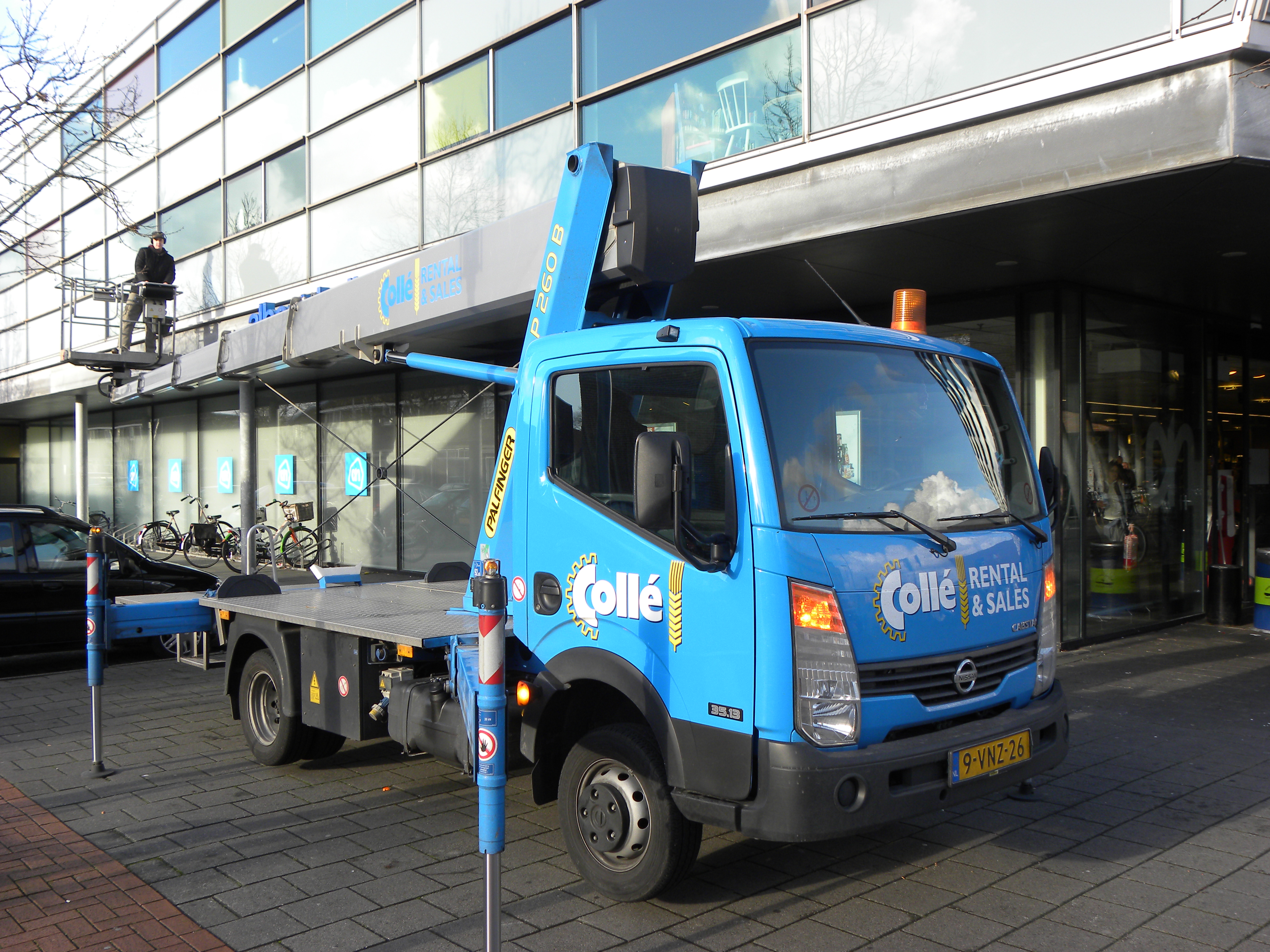 Nissan Cabstar Colle rentals & sales